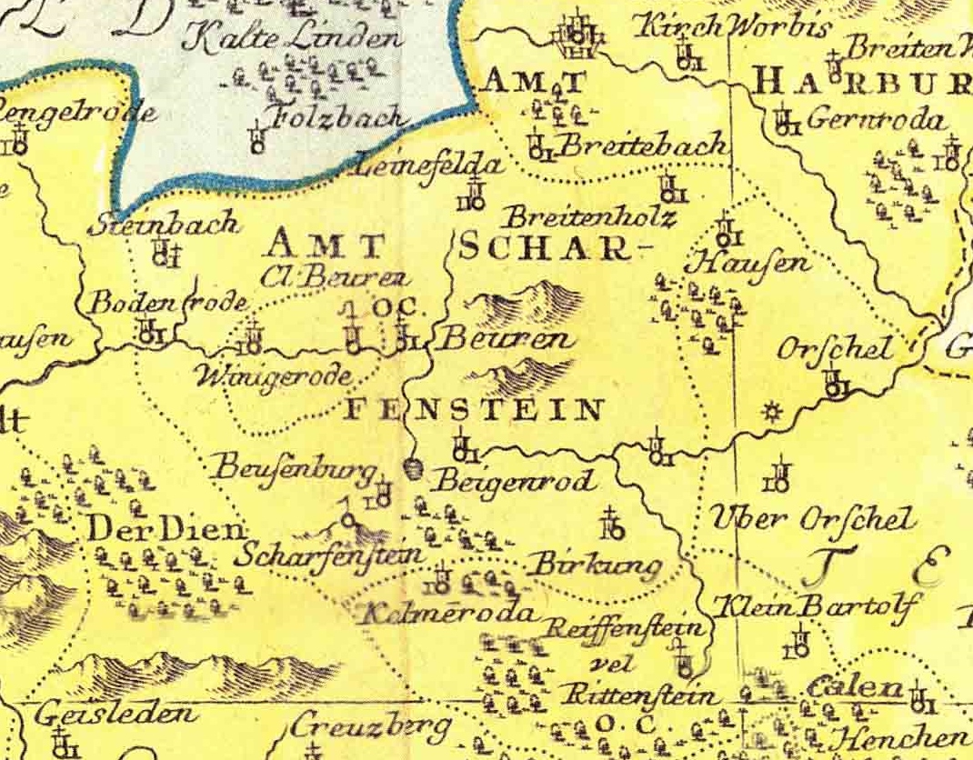 Ausschnitt aus der historischen Karte "Tractus Eichsfeldiae": das Amt Scharfenstein und Kloster Reifenstein, Beuren